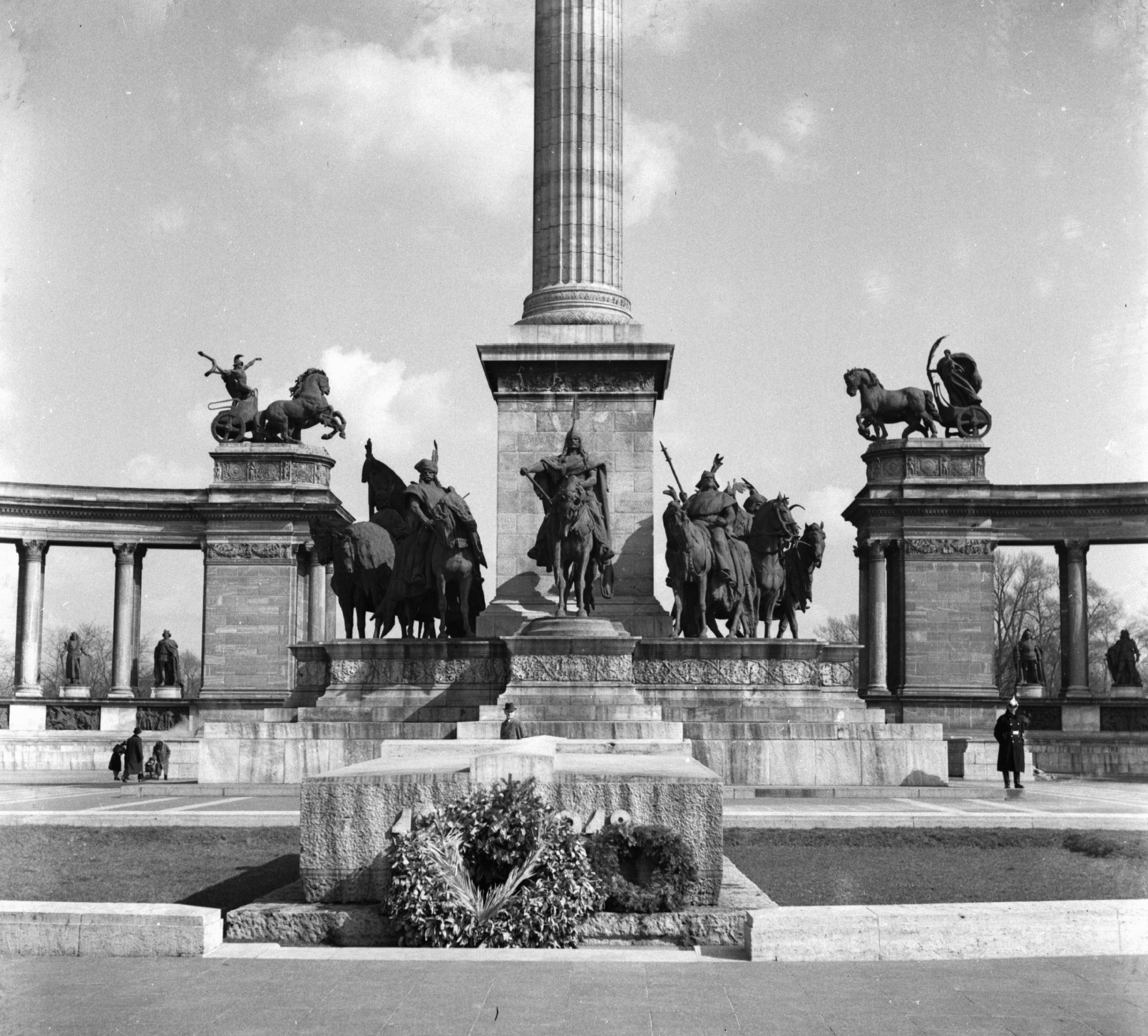 Hősök tere, a Magyar Hősök emlékköve.